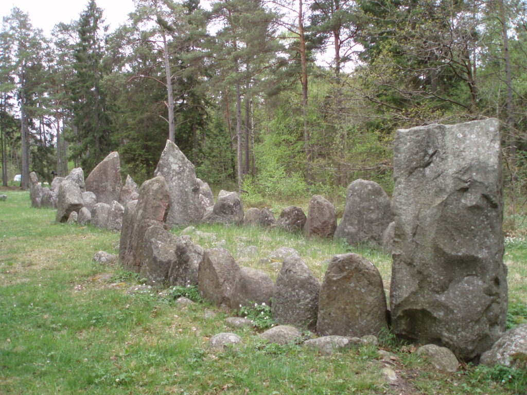 Vy mot söder av de fyra stenskeppen.